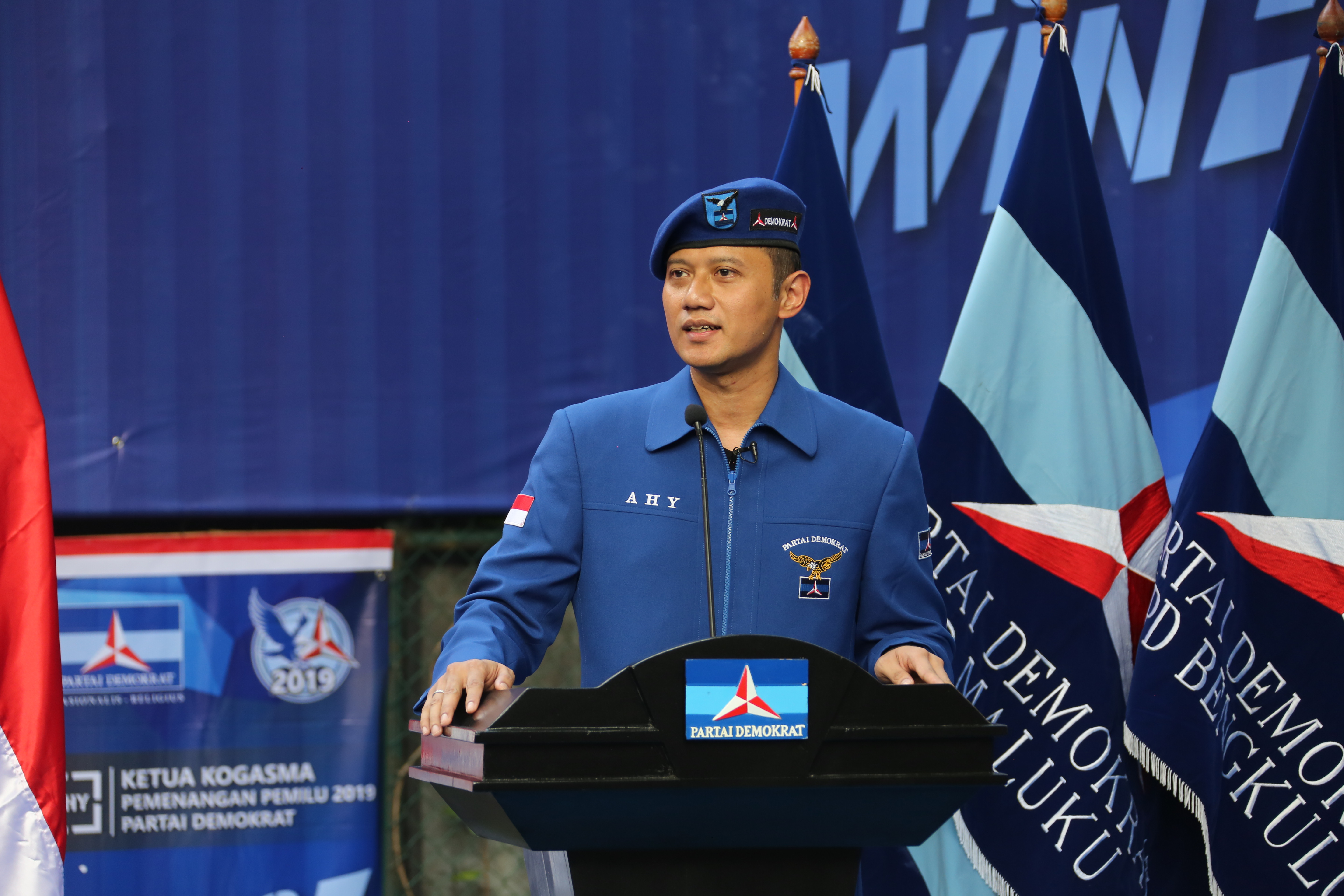 AHY Kogasma